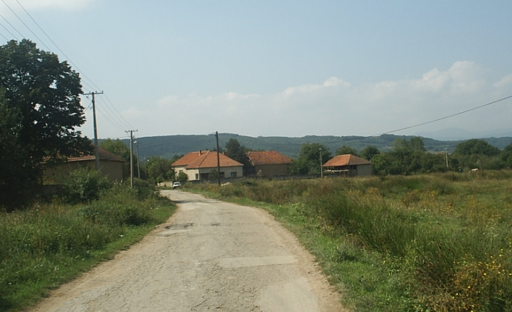 Калабовце.